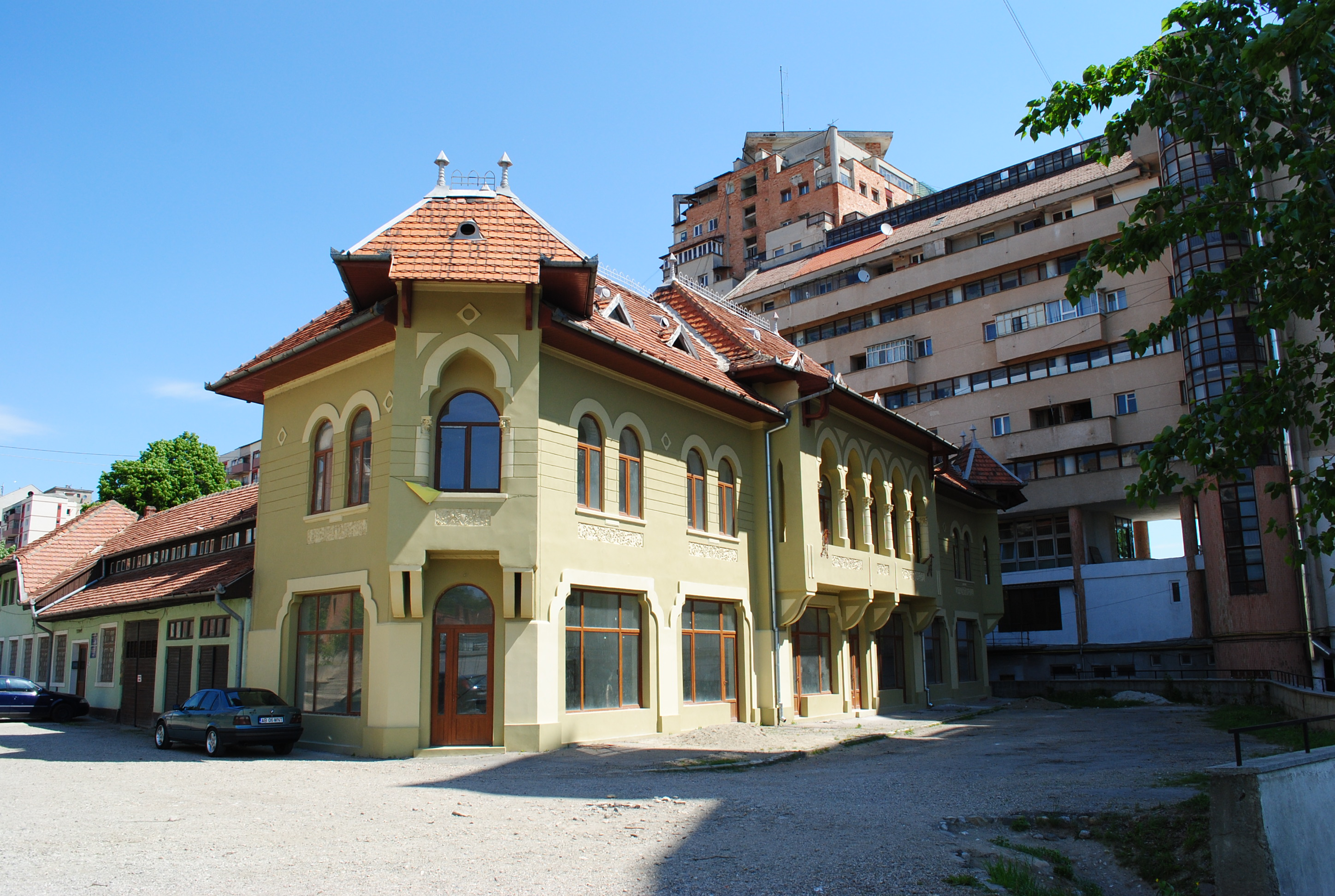 Ansamblul urban "Str. Decebal" sec. XX